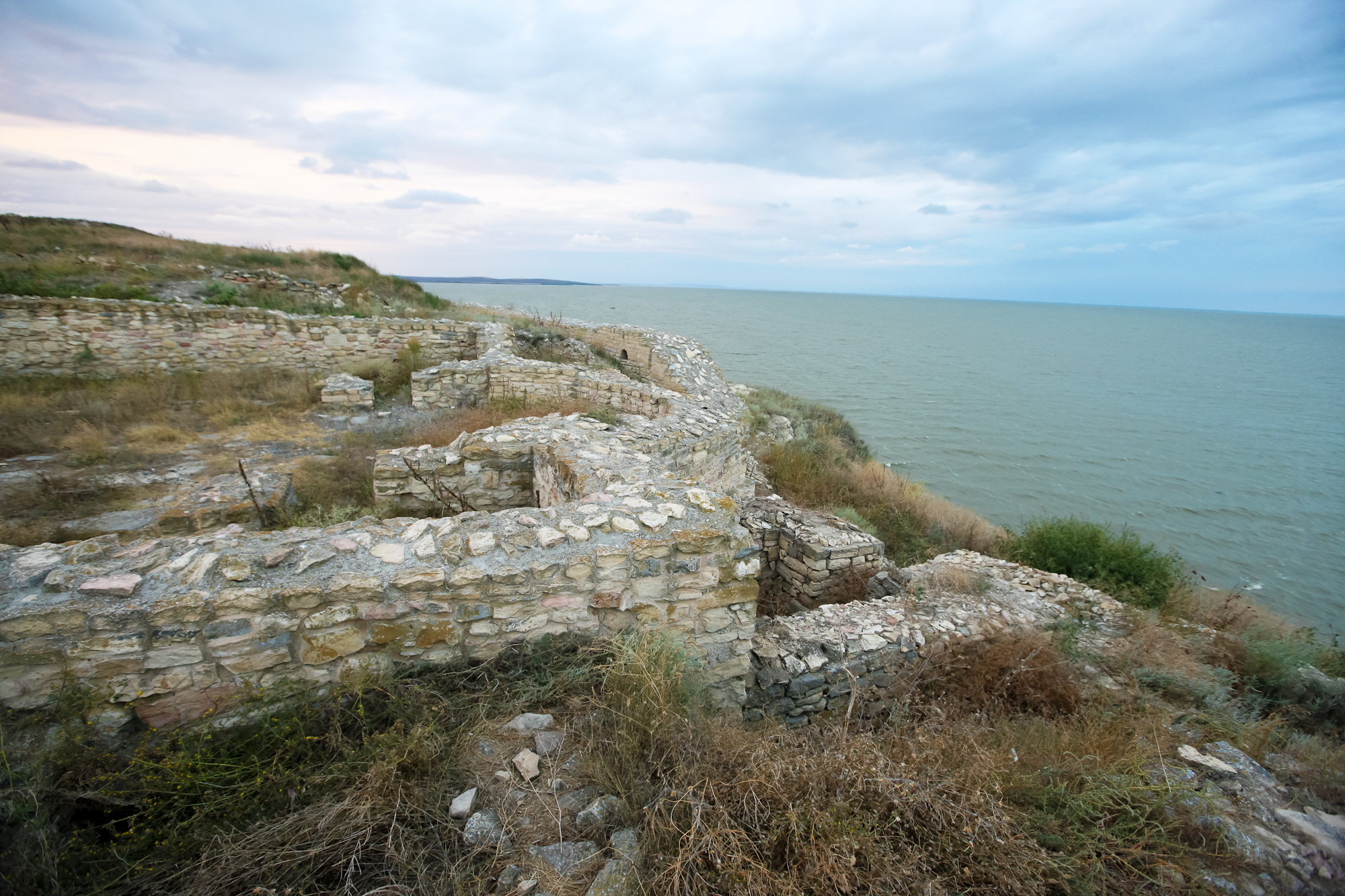 Ruinele cetatii romane Orgame - Argamum 01